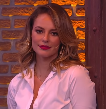 Paolla Oliveira no programa Lady Night em 2018.